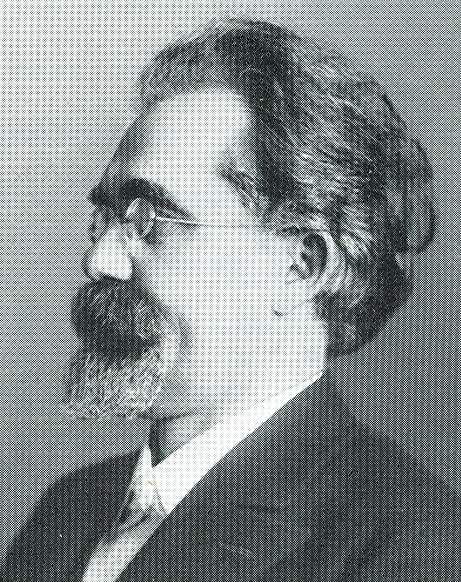 Koloman Kaiser, Portrait-Aufnahme